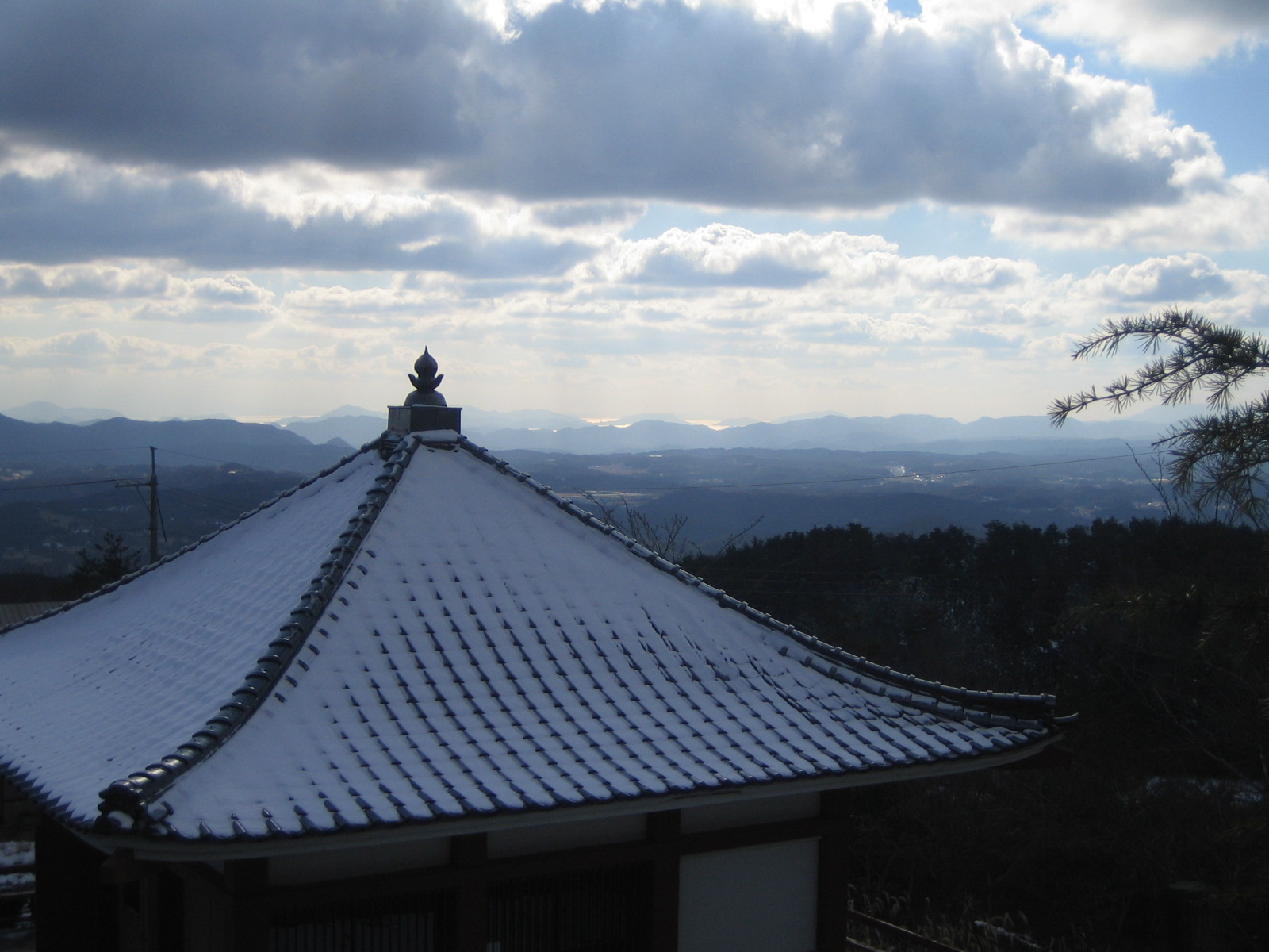 宇根山からの眺望